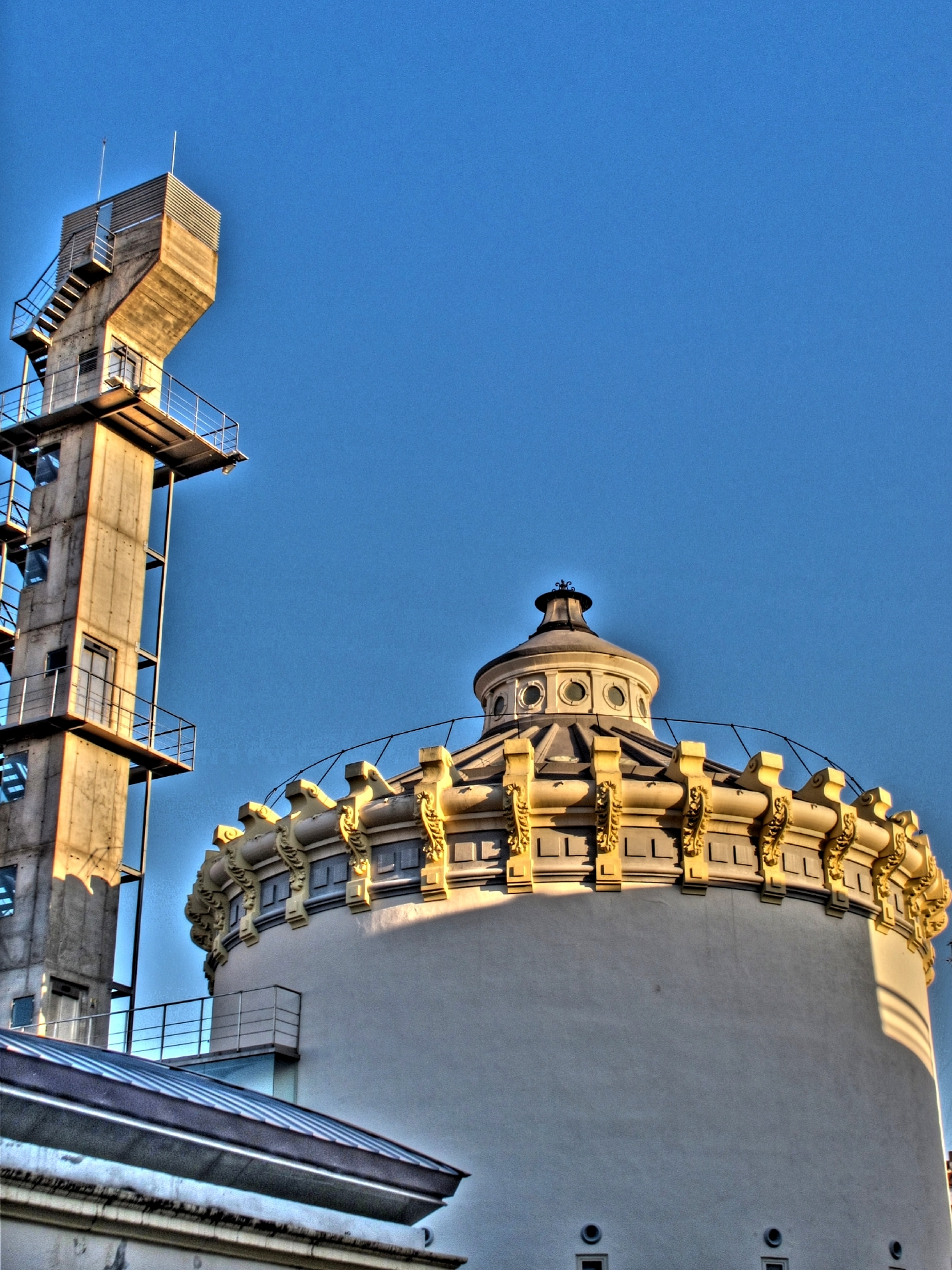 Depósitos del Sol. Albacete